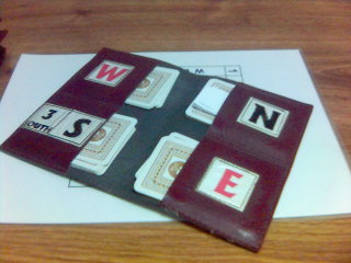 Popis: Obal na karty v bridži (angl. board) s vyznačenými stranami a stavom hier. Linka EW je v druhe hre, NS v prvej, rozdávajúcim je juh. Autor: Otm Licencia: voľné použitie Kategória:bridž Kategória:Obrázky hier